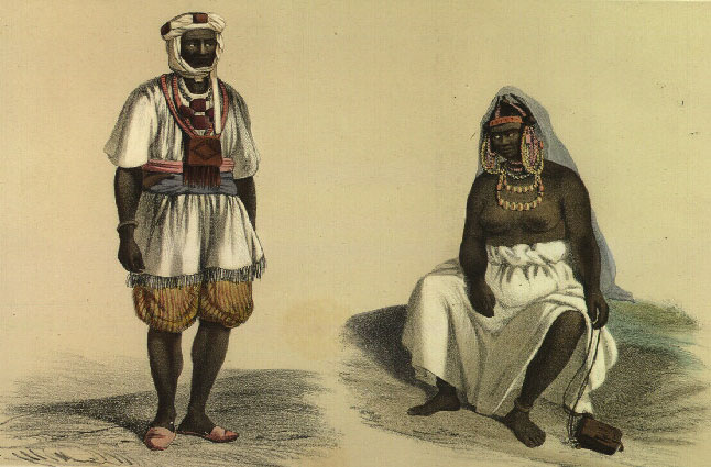 Griots du pays de Bondou : homme en costume de cérémonie à gauche et femme en costume ordinaire (illustration de Voyage dans l'Afrique occidentale, comprenant l'exploration du Sénégal... exécuté en 1843 et 1844 par une commission composée de MM. Huard-Bessinières, Jamin, Raffenel, Peyre-Ferry et Pottin-Patterson)